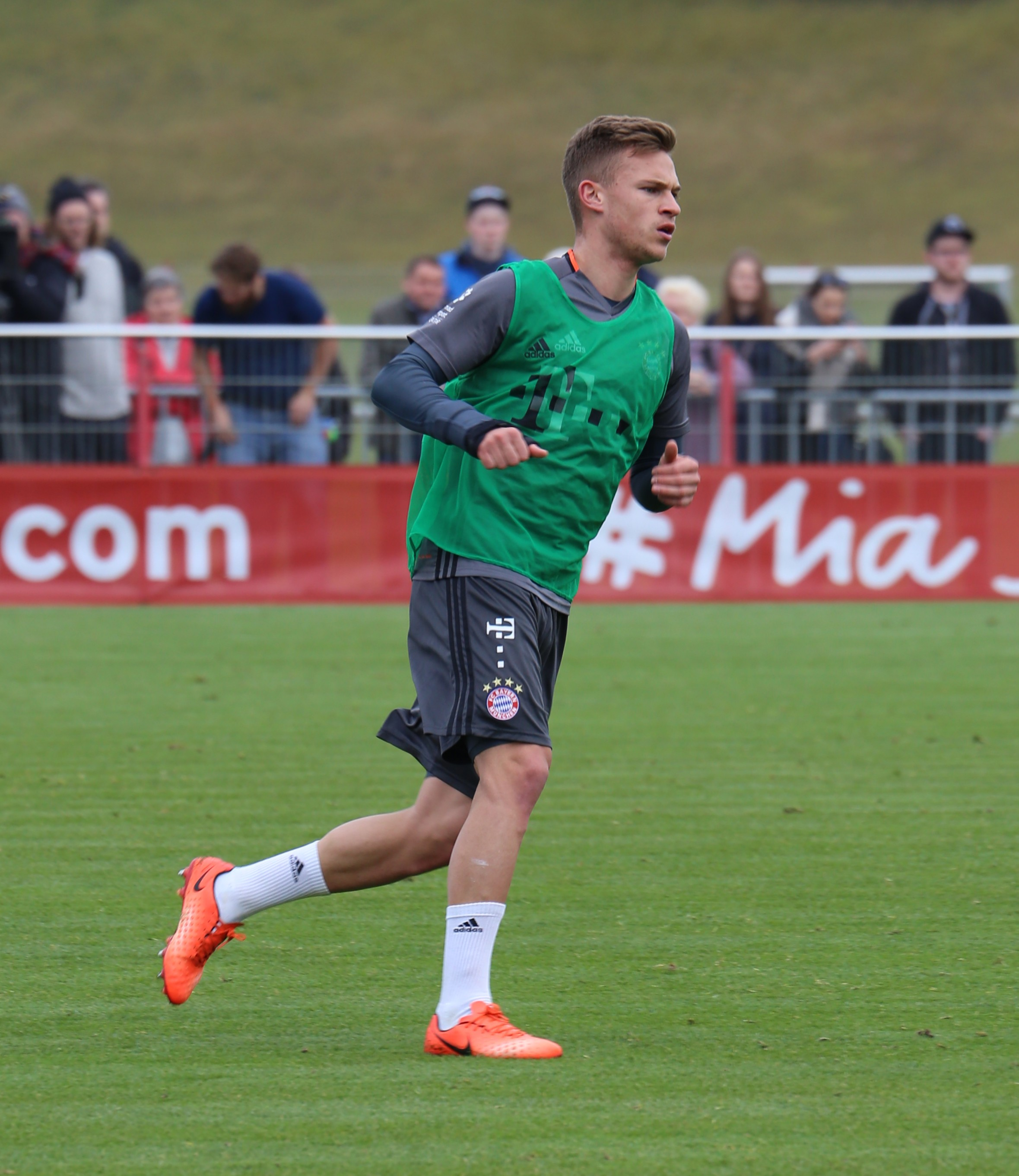 Joshua Kimmich am 14. März 2017 beim Training auf dem Gelände des FC Bayern München